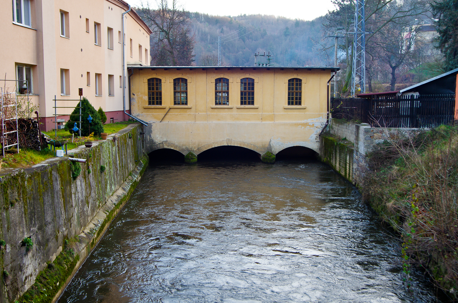 Ohře v Lokti, náhod vodní elektrárny